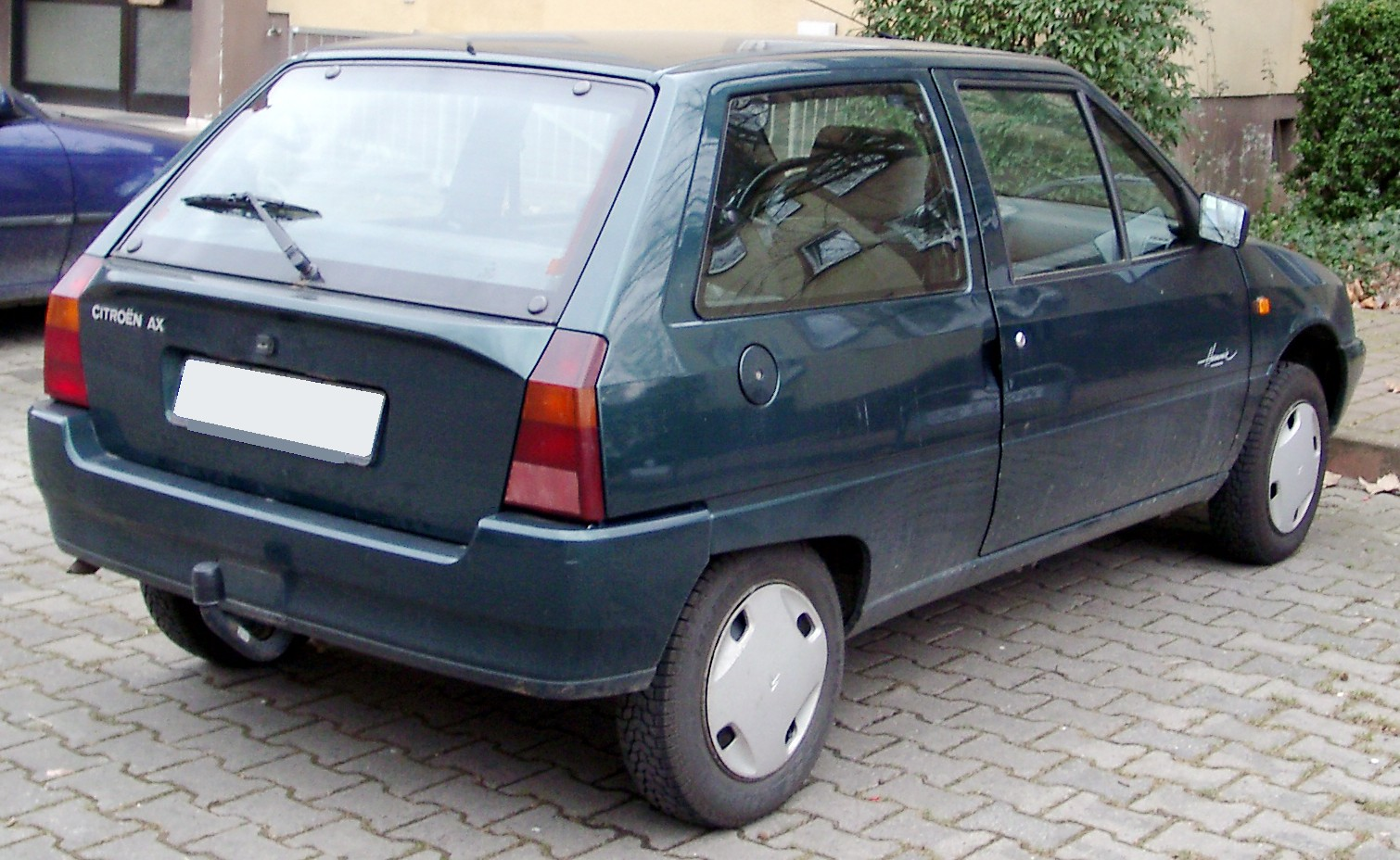 Citroën AX